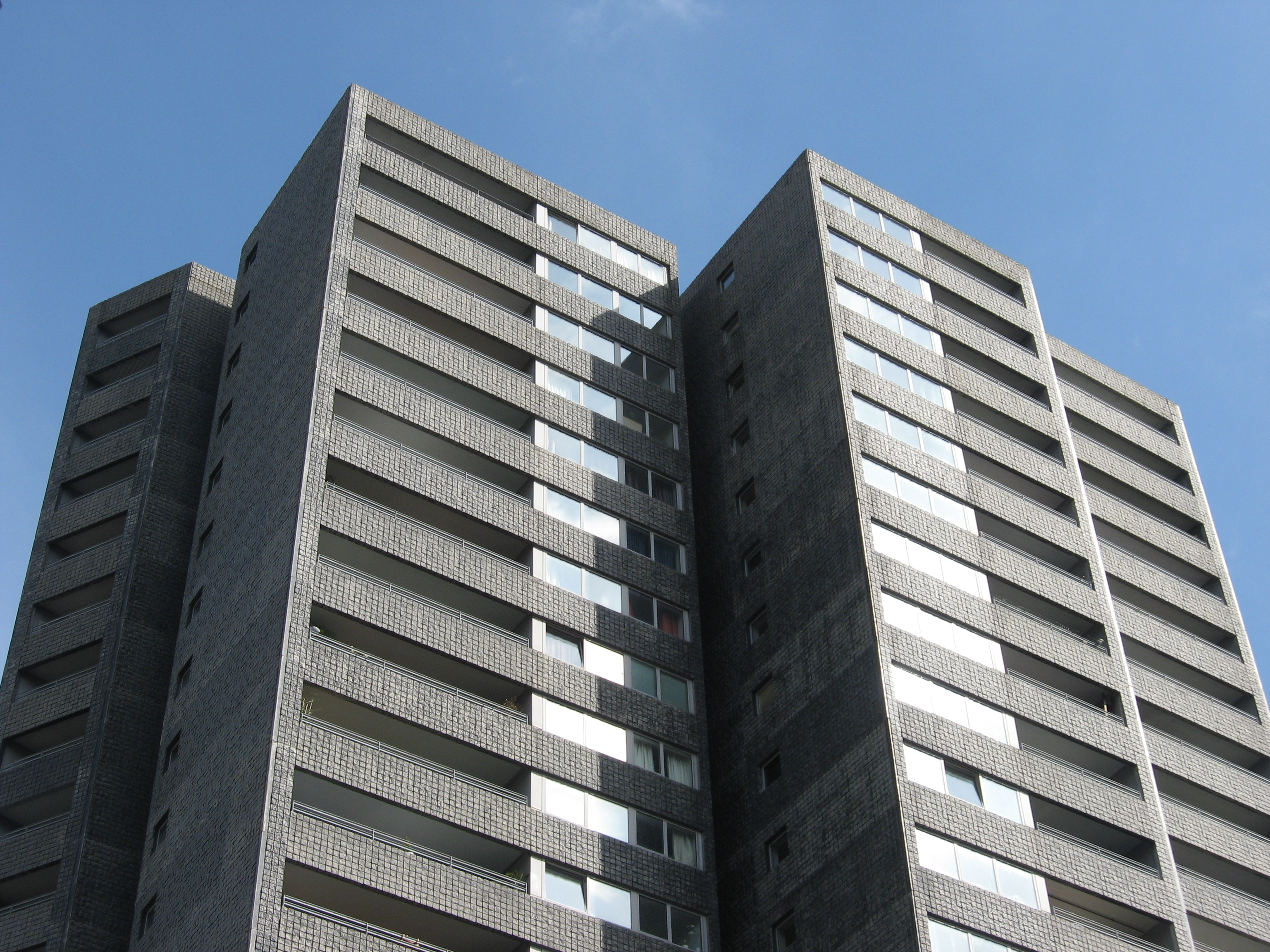 KNSM Island